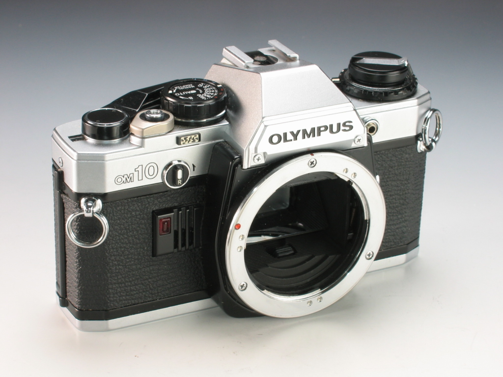 Olympus_OM-10 without lens